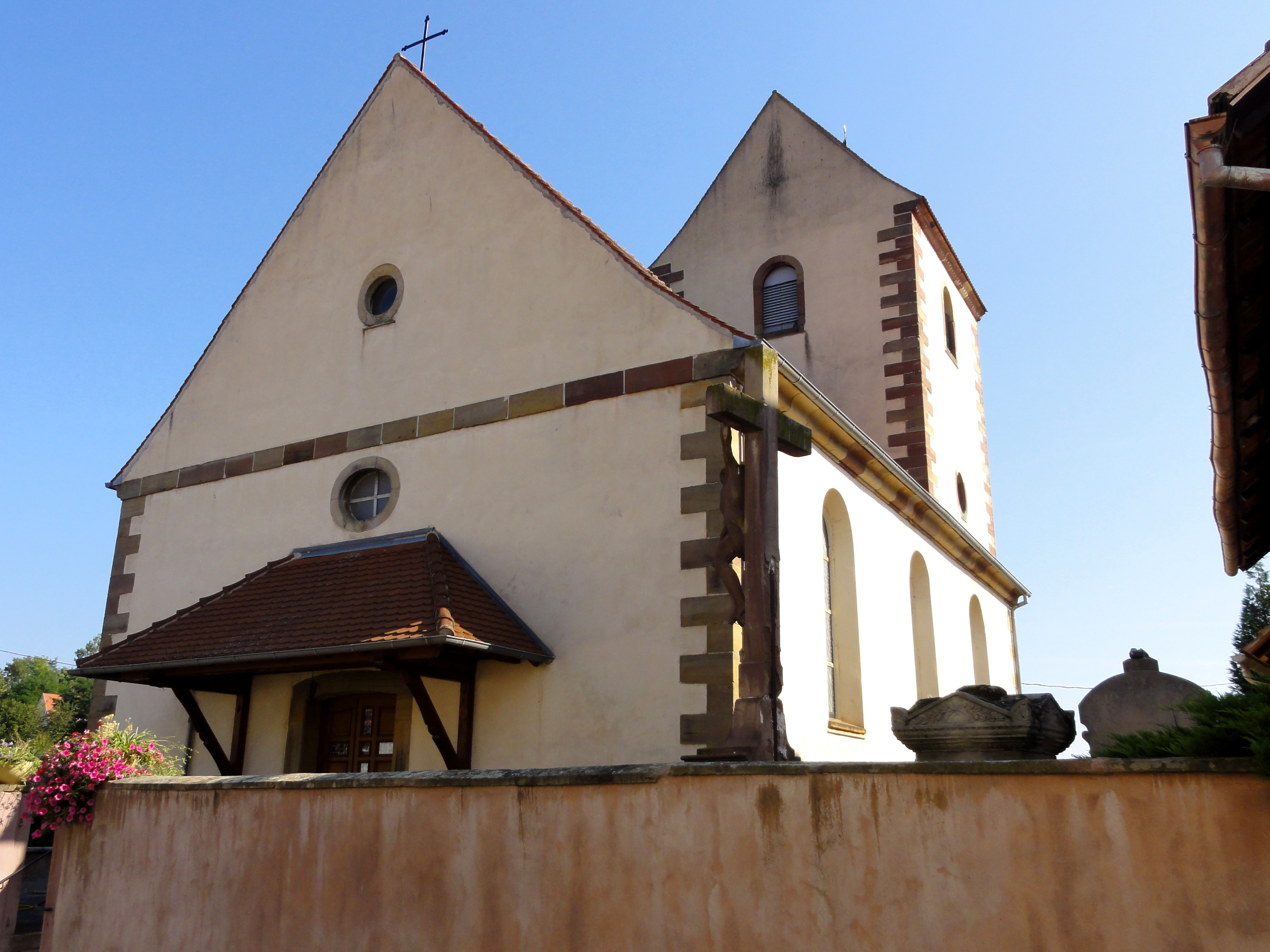 Alsace, Bas-Rhin, Kienheim, Église Saint-Nicolas